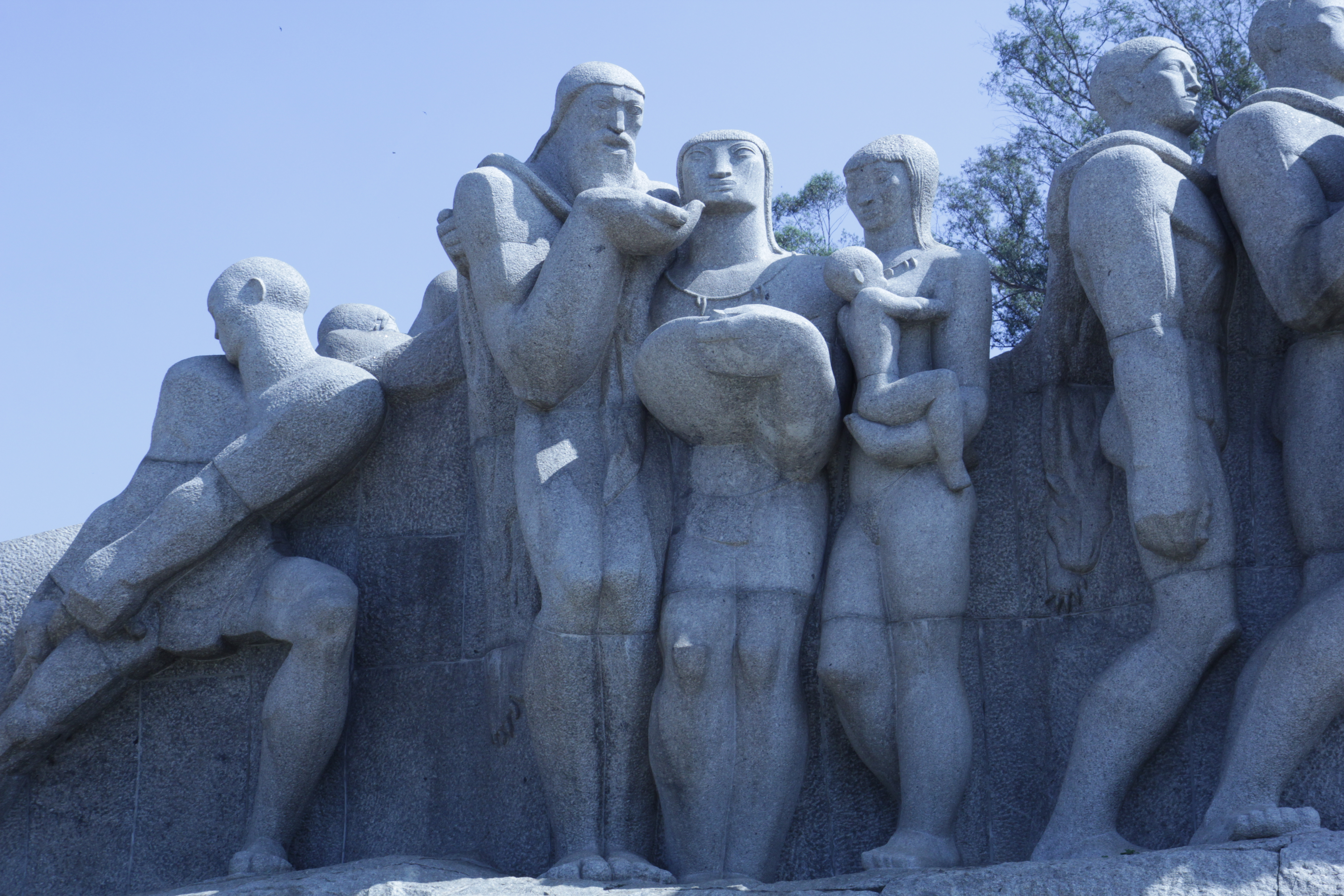 Com mais detalhes, a imagem mostra que o homem que compõe a família representada no Monumento às Bandeiras é um bandeirantes, representado pelas suas longas barbas.